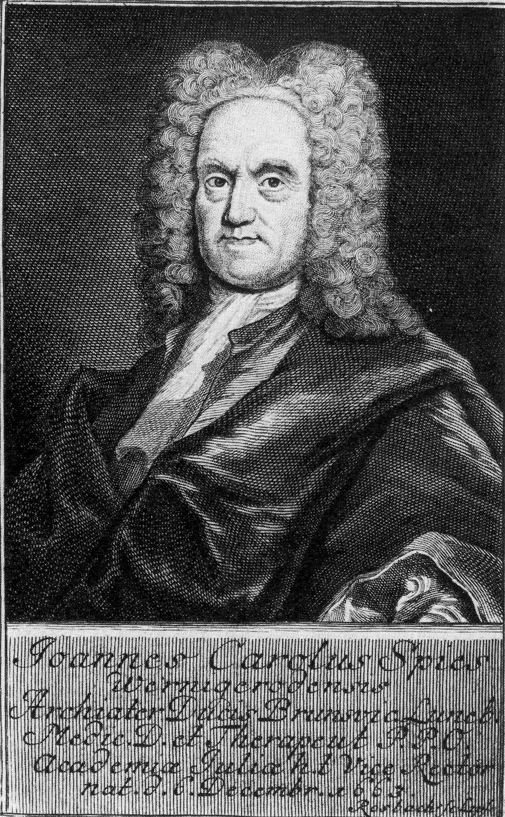 Johann Carl Spiess (1663–1729), Professor an der Universität Helmstedt.